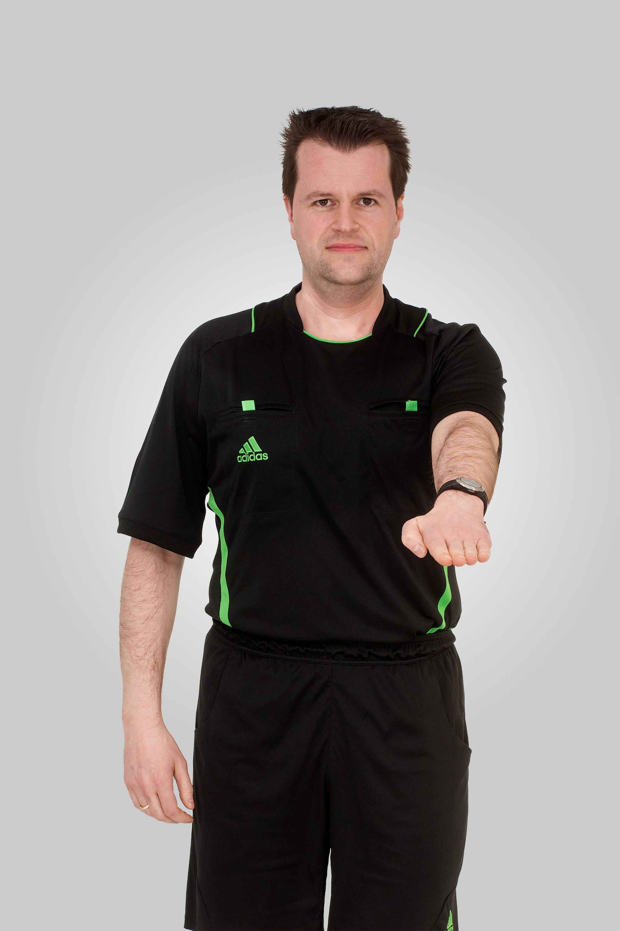 Internationale Handballregeln Handzeichen 01 Betreten des Torraums